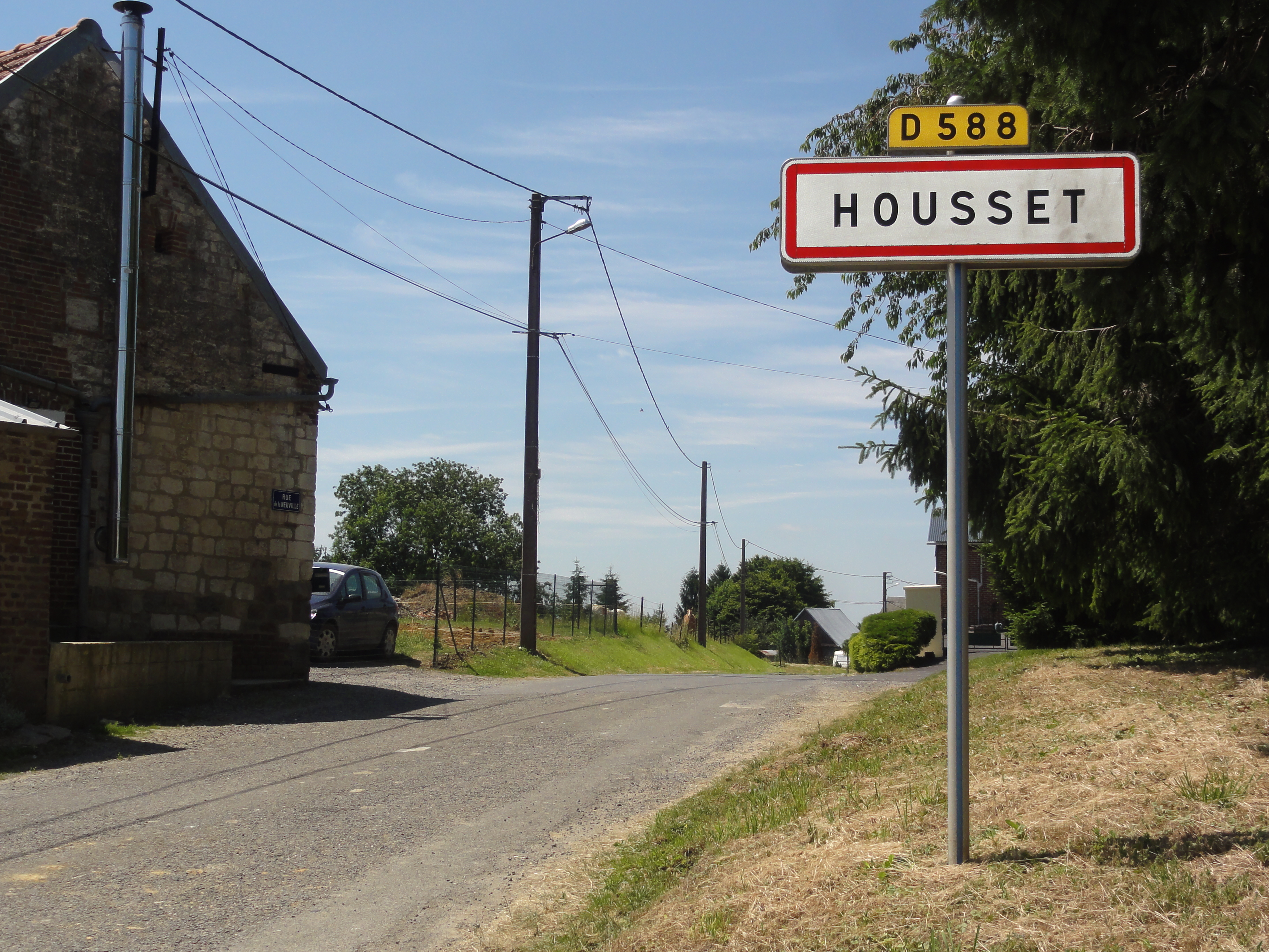 Housset Housset (Aisne) city limit sign